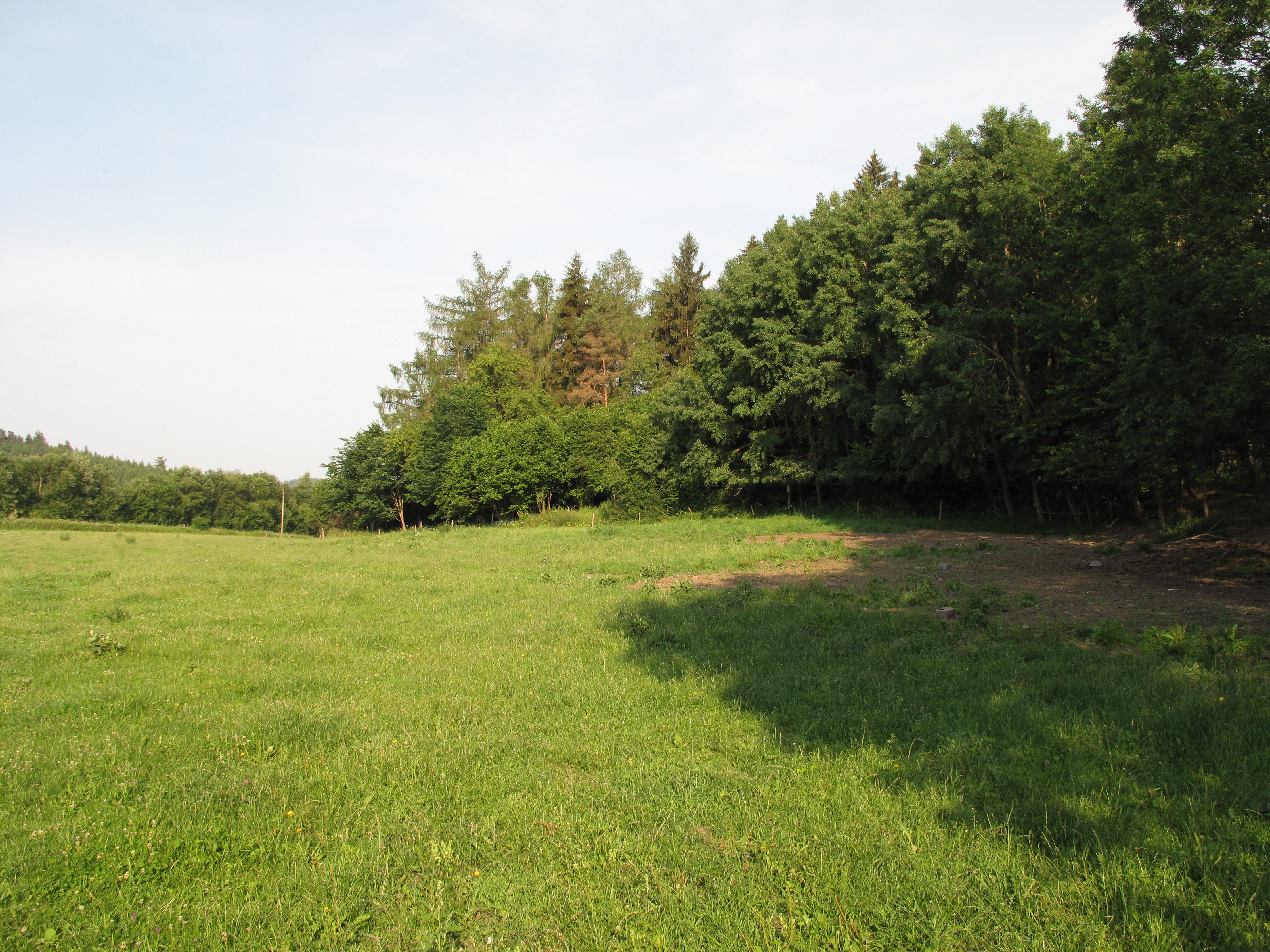 Přírodní památka Slavkovský chlumek. Okres Český Krumlov, Česká republika.